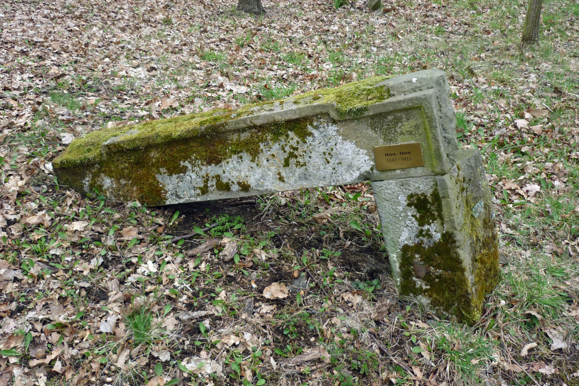 Lapidarium der zerstörten Orte im Duppauer Gebirge auf dem Winteritzer Kapellenberg: Türgewände aus Hora – Horn (1542-1953)